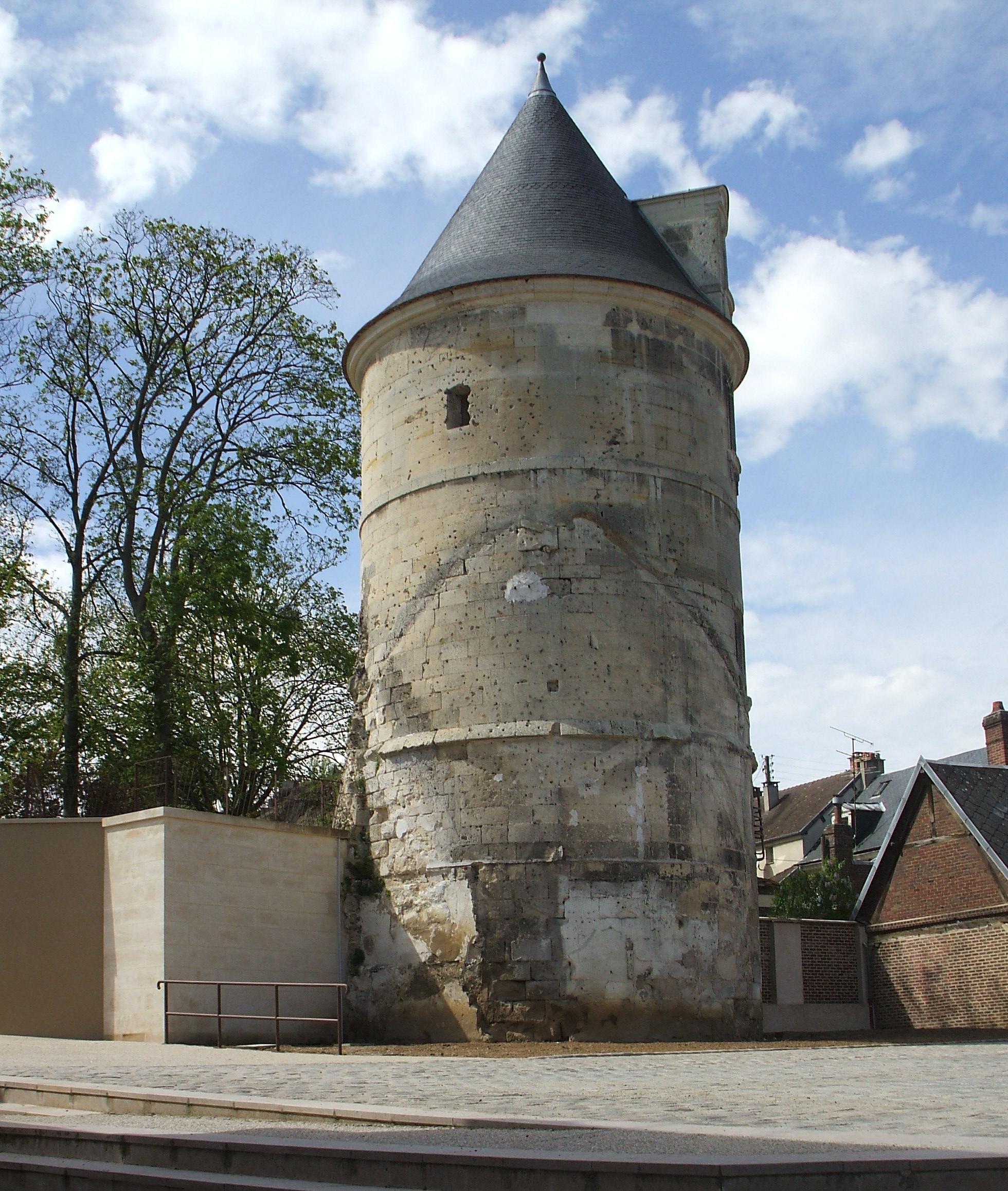 La tour des Conti : seul vestige du château de Méru.